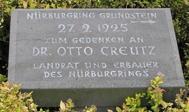 Nürburgring Grundstein 27.09.1925 Landrat Dr. Otto Creutz IMG_0411